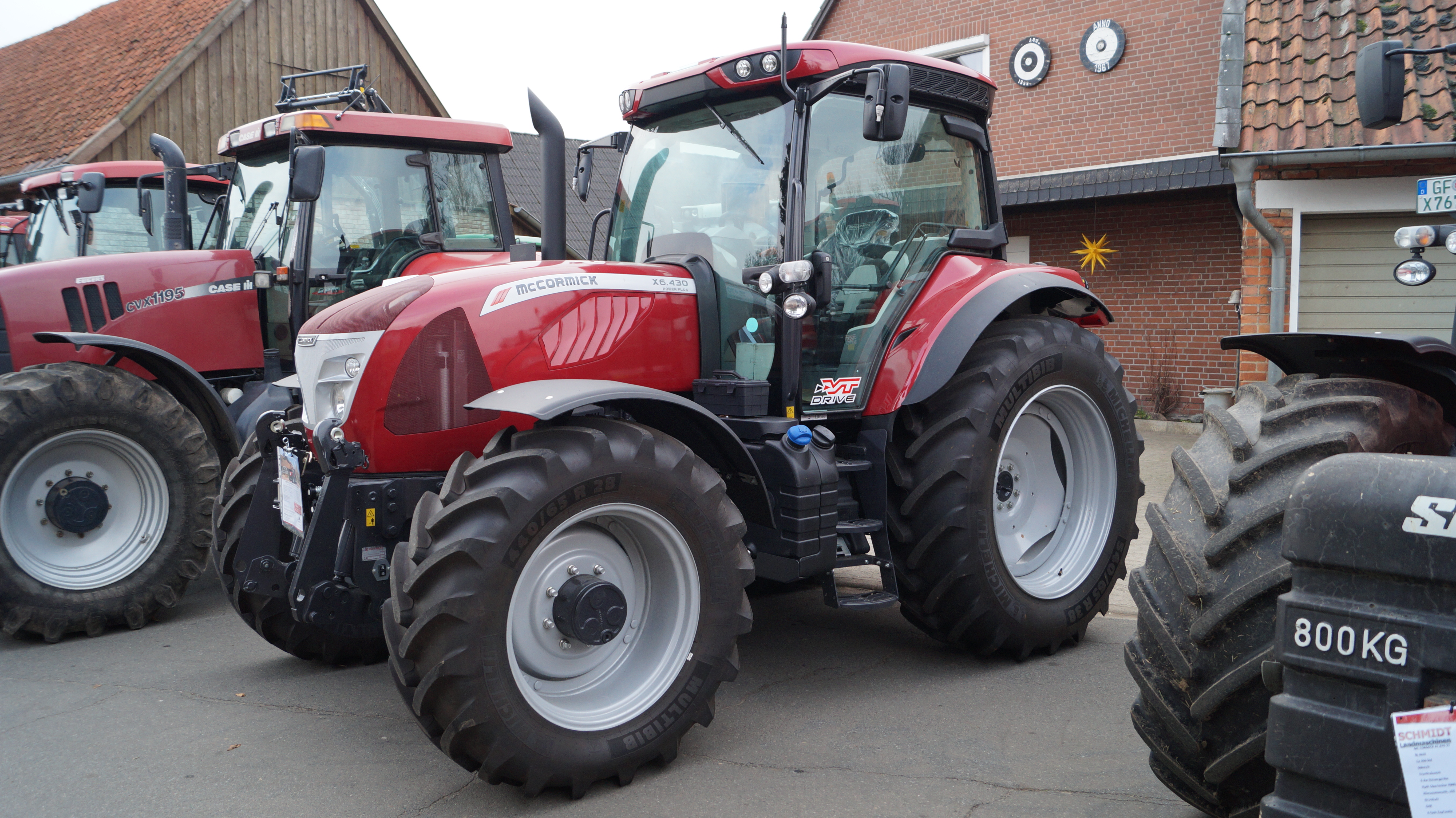 Schrägansicht der Front eines McCormick X6.430 VT-Drive Power Plus, ausgestellt bei der Schmidt Landmaschinen GmbH & Co. KG im Obernholzer Ortsteil Steimke.